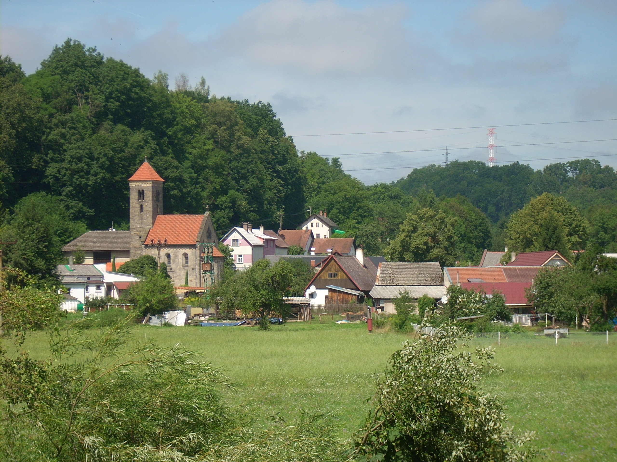 Kostel Nanebevzetí P. Marie (Mohelnice nad Jizerou), náves, Mohelnice nad Jizerou